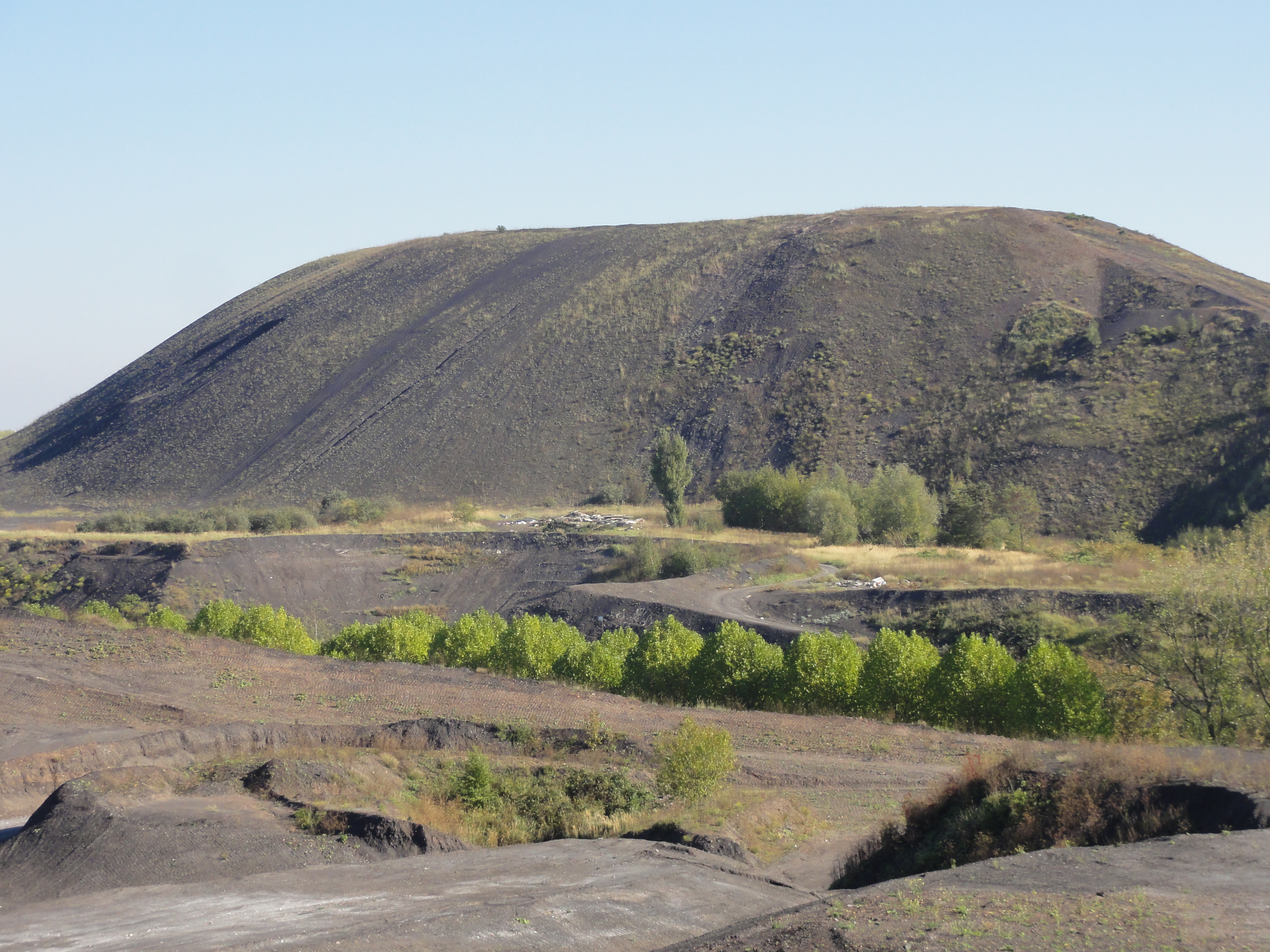 Terril n° 205 dit 1 de Drocourt, fosse n° 1 de la Compagnie des mines de Drocourt dans le bassin minier du Nord-Pas-de-Calais, Hénin-Beaumont, Pas-de-Calais, Nord-Pas-de-Calais, France. Le terril no 205 est inscrit sur la liste du patrimoine mondial de l'Unesco le 30 juin 2012 et y constitue en partie le site no 48.